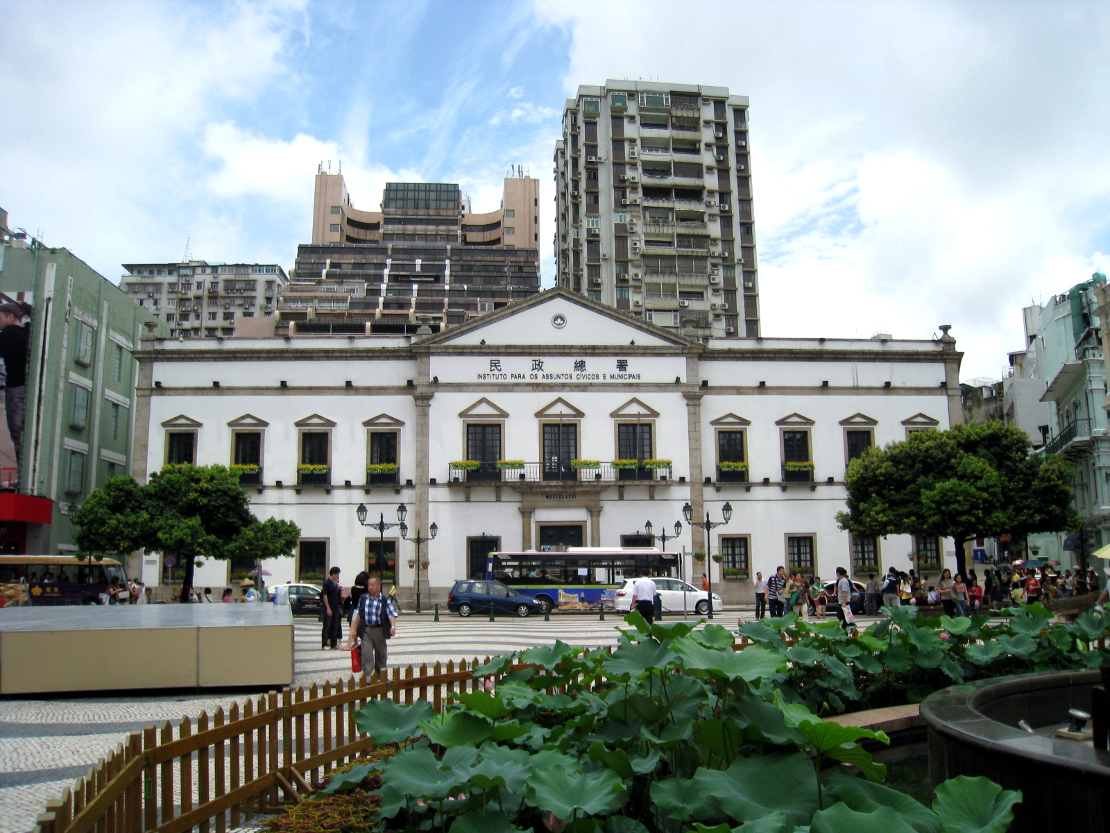 Macao Edificio do Leal Senado 澳門民政總署大樓